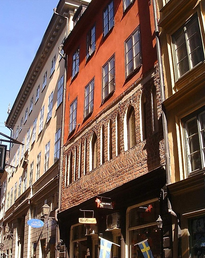 Façade of 29, Västerlånggatan, Gamla stan, Stockholm.